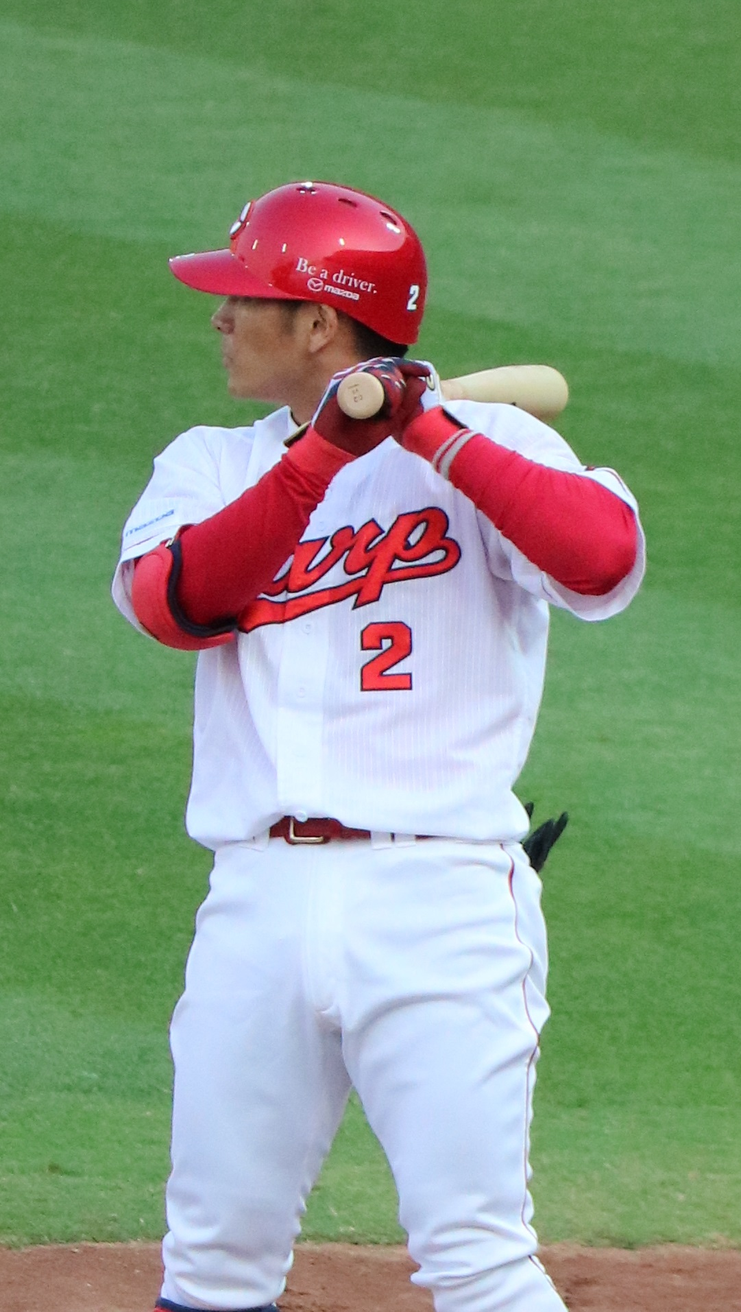 打席での田中(2017/6/15 MAZDA Zoom-Zoom スタジアム広島 にて)